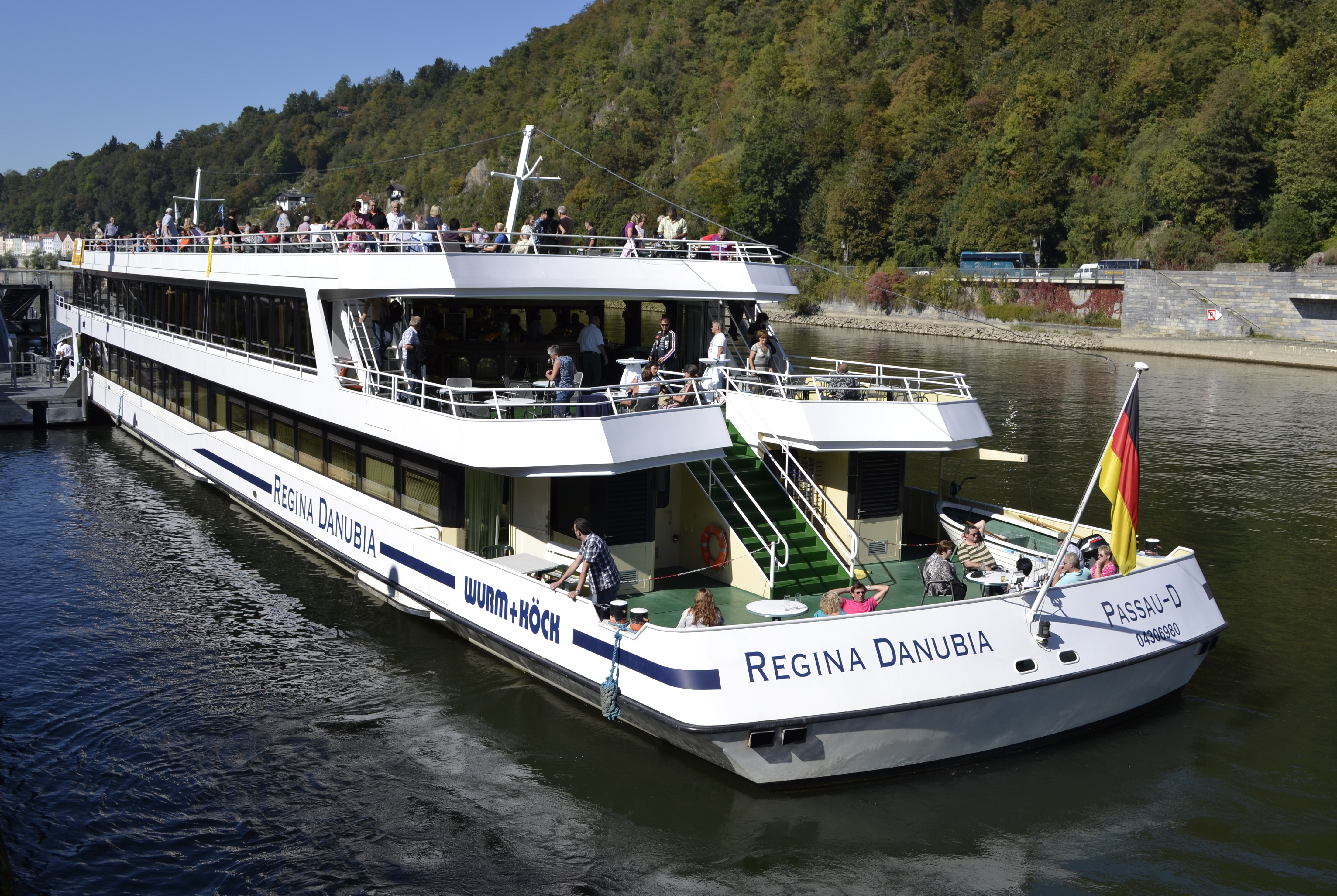 Das Wurm&Köck-Schiff "Regina Danubia" (früher „MS Donau“) in Passau.